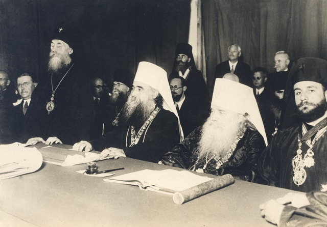 Присуждение титула Почетного доктора богословия Сербского богословского факультета Белградского университета митрополиту Антонию (Храповицкому). 1934. РФК На первом плане (слева направо): В.Н.Штрандтман, Архиепископ Кишинёвский и Хотинский Анастасий (Грибановский), Святейший Патриарх Варнава (Росич), митрополит Антоний (Храповицкий), митрополит Ливанский Илия (Карам)